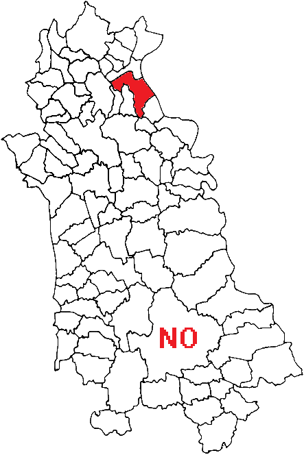 Mappa con posizione del comune nella provincia italiana di Novara